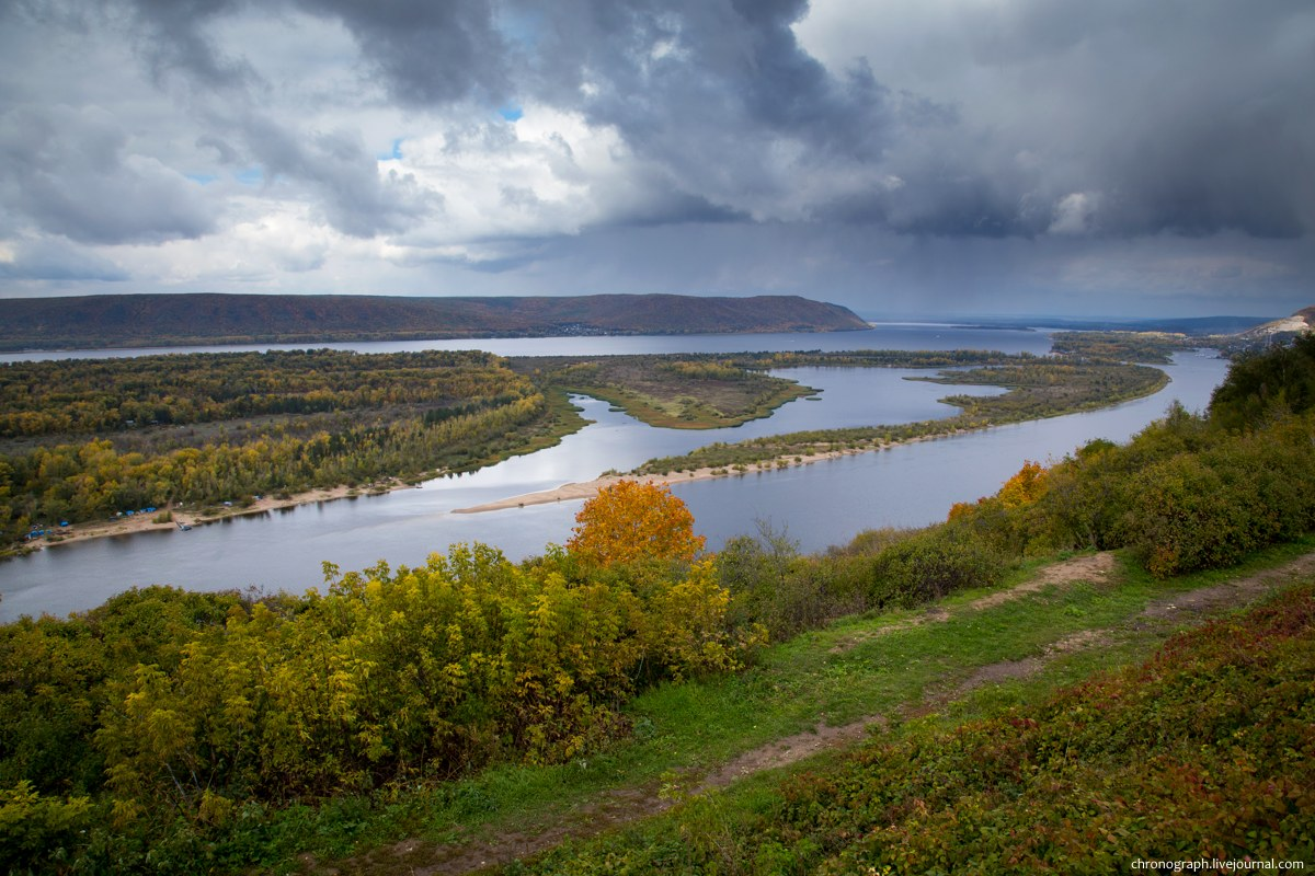 Вид со смотровой площадки "Вертолётка". Посёлок Управленческий, Красноглинский район Самары, Россия.